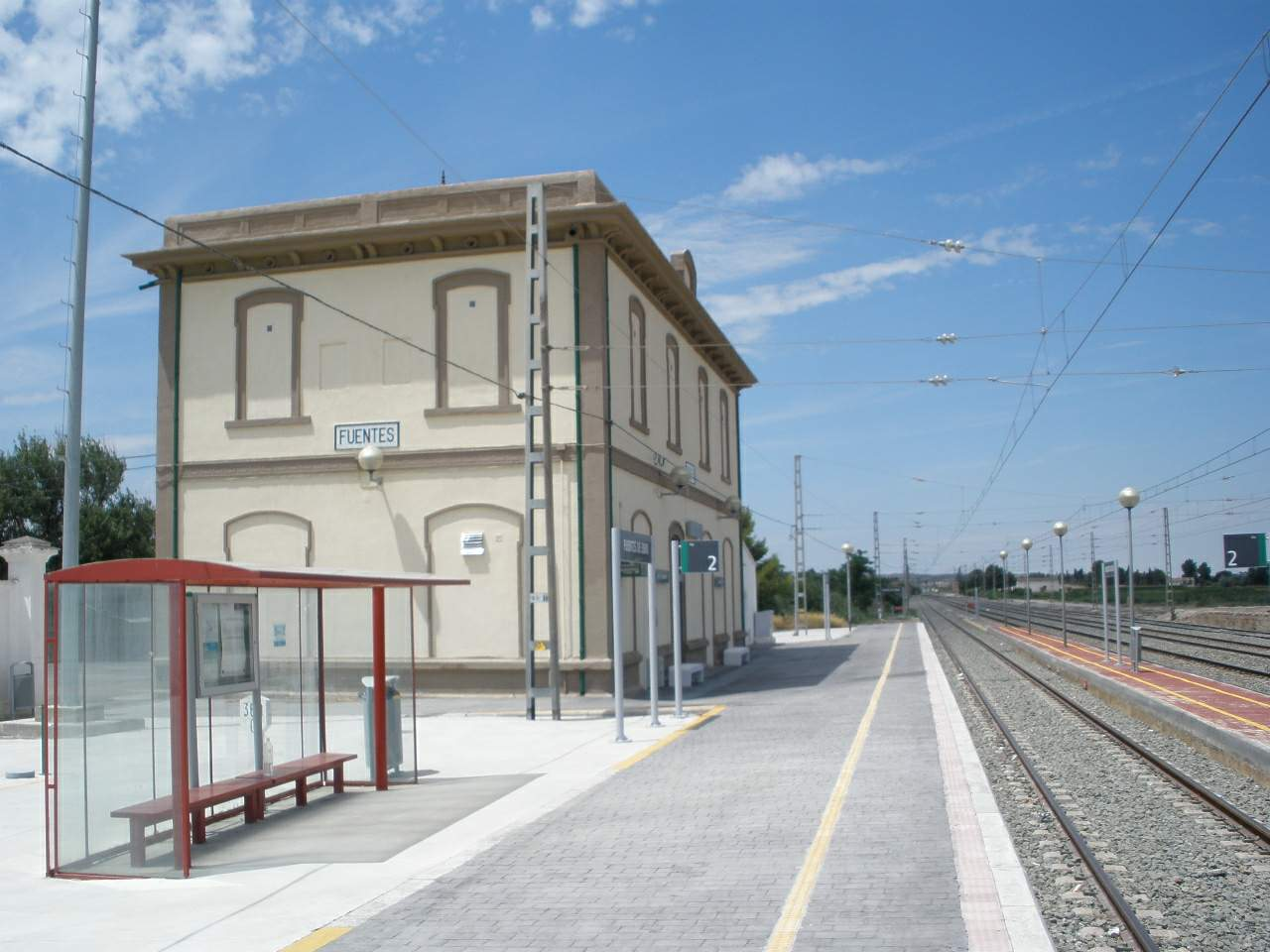 Fuentes de Ebro (Zaragoza)